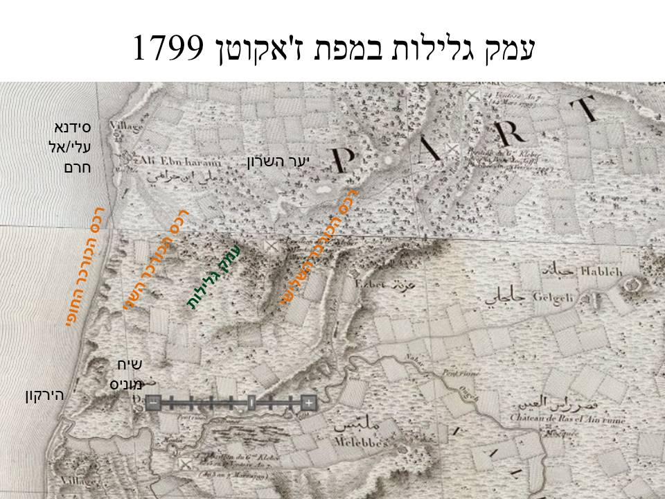 עמק גלילות כפי שתואר במפת ז'אקוטן 1799 ששורטטה במסע המלחמה של נאפוליון לארץ ישראל